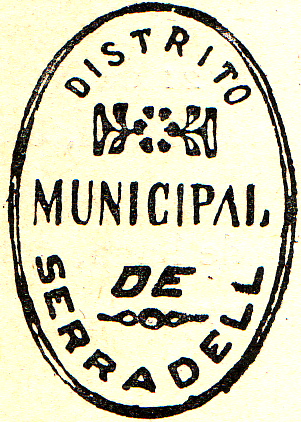 Segell municipal antic de Serradell (Conca de Dalt, Pallars Jussà)